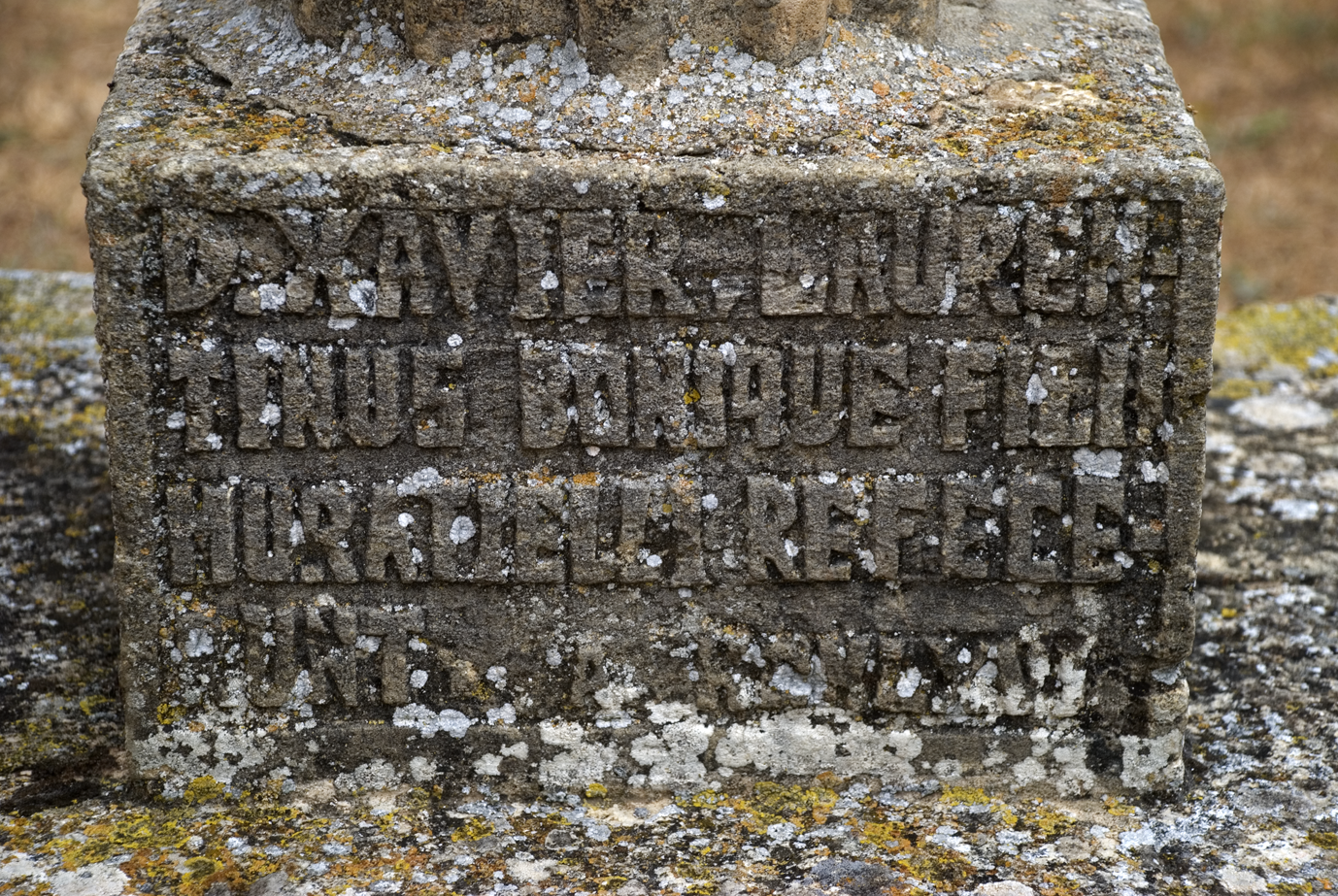 Iglesia de San Esteban en Moradillo de Sedano Burgos (España). Fecha y maestro de reconstrucción.